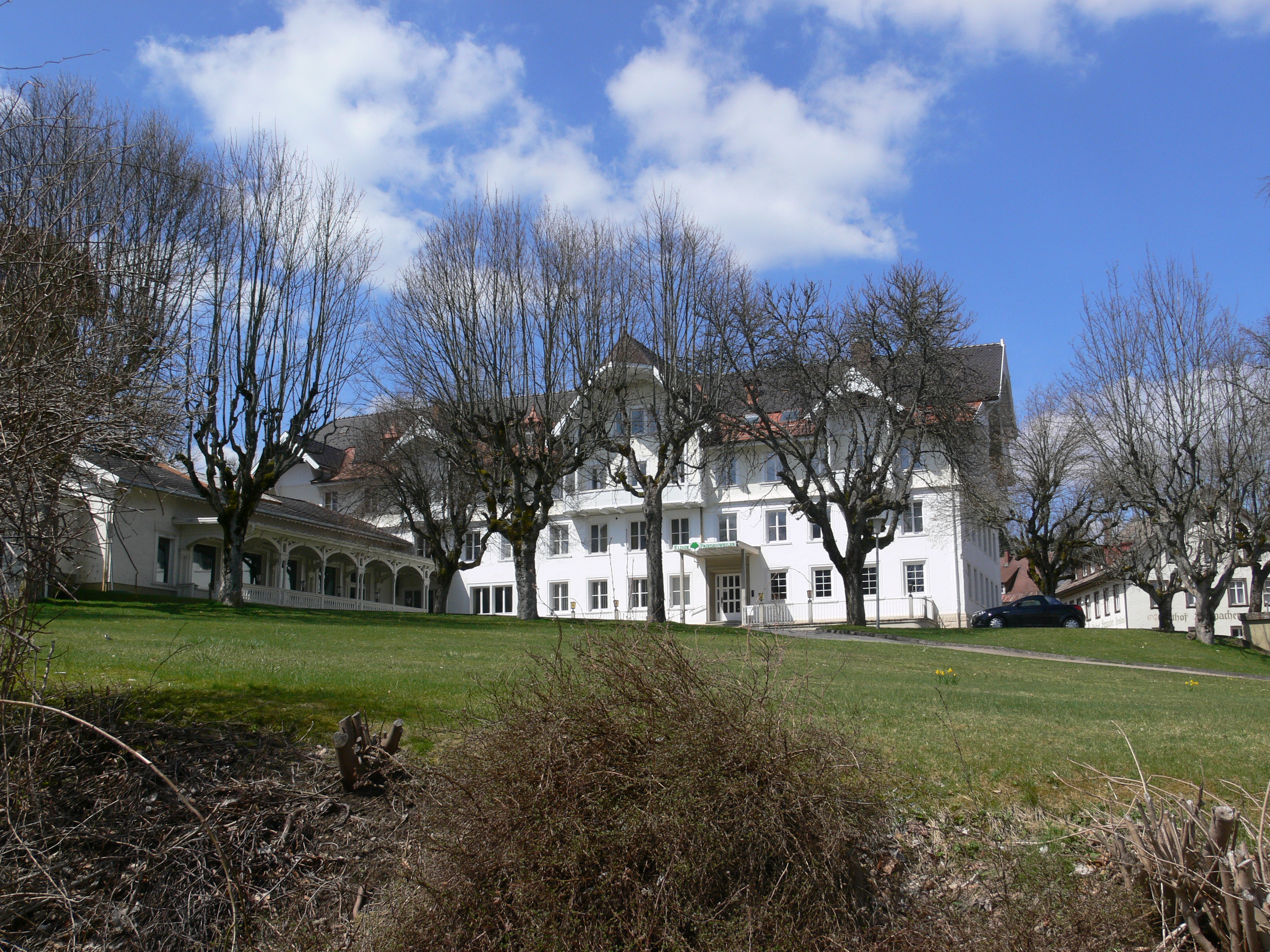 Friedenweiler, Klinik (ehem. Kurhaus)